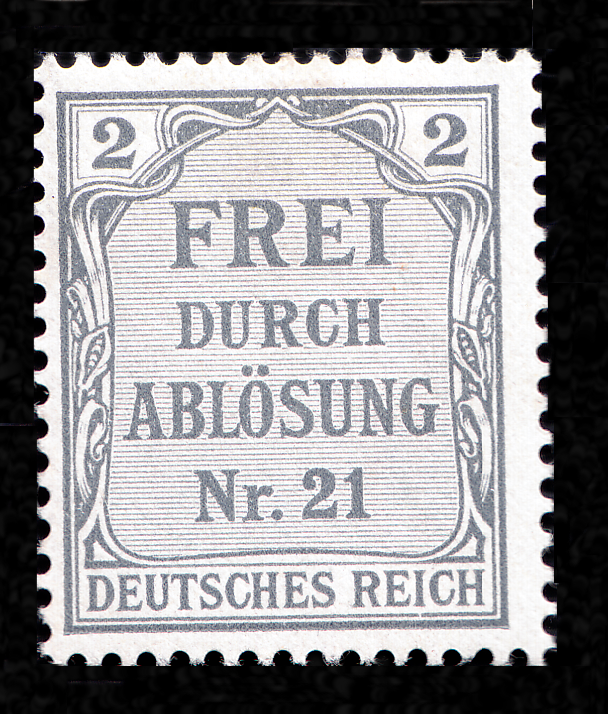 Deutsches Reich 1 DM